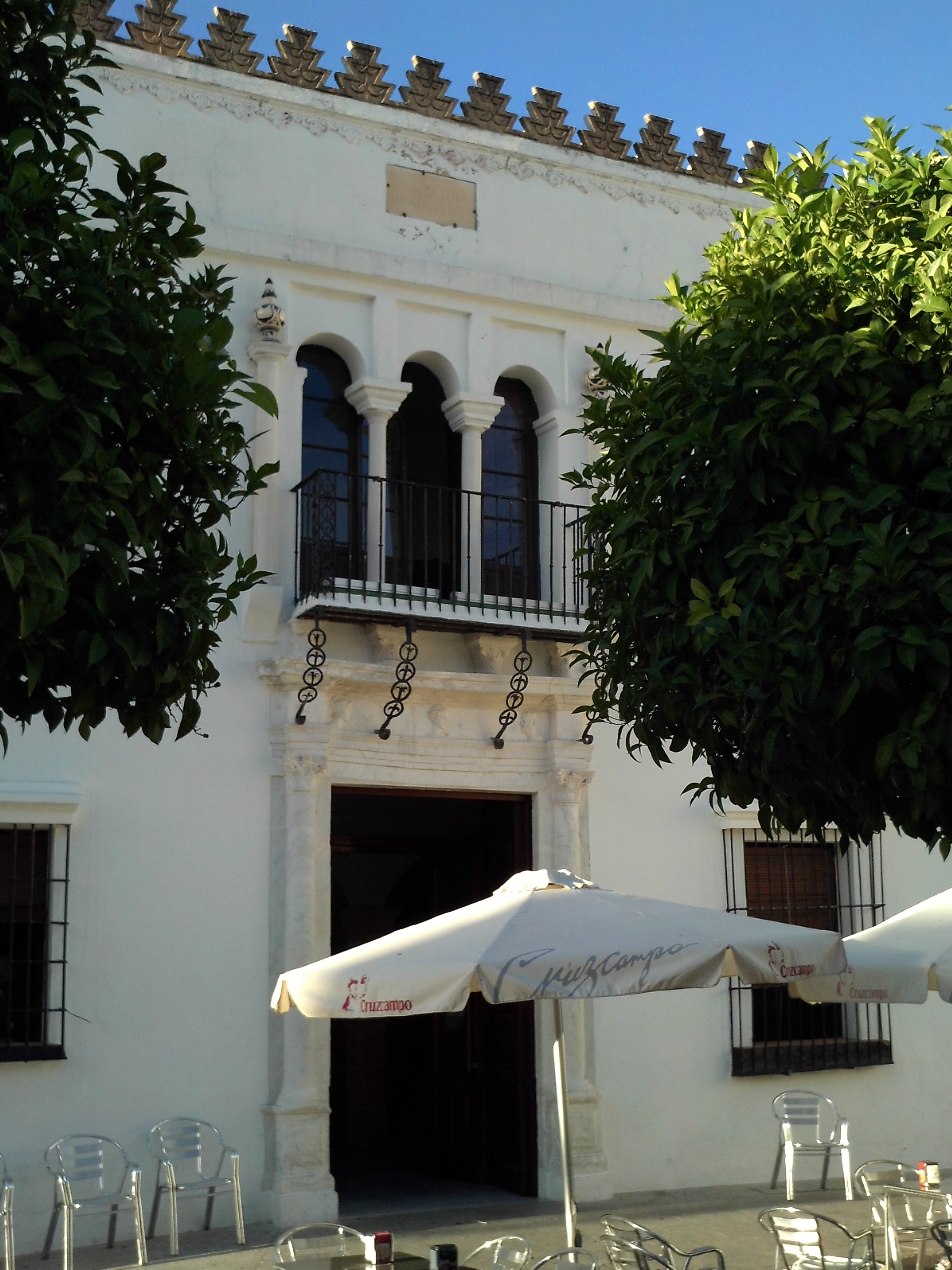 Puerta del palacio del conde-duque de Olivares, con un pórtico de mármol blanco. Plaza de España de Olivares, provincia de Sevilla, Andalucía, España.